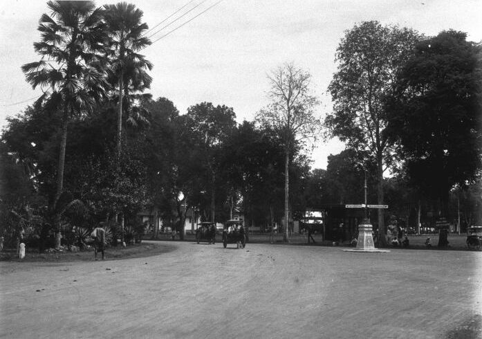 Foto. De aloen-aloen te Djember op Oost-Java.